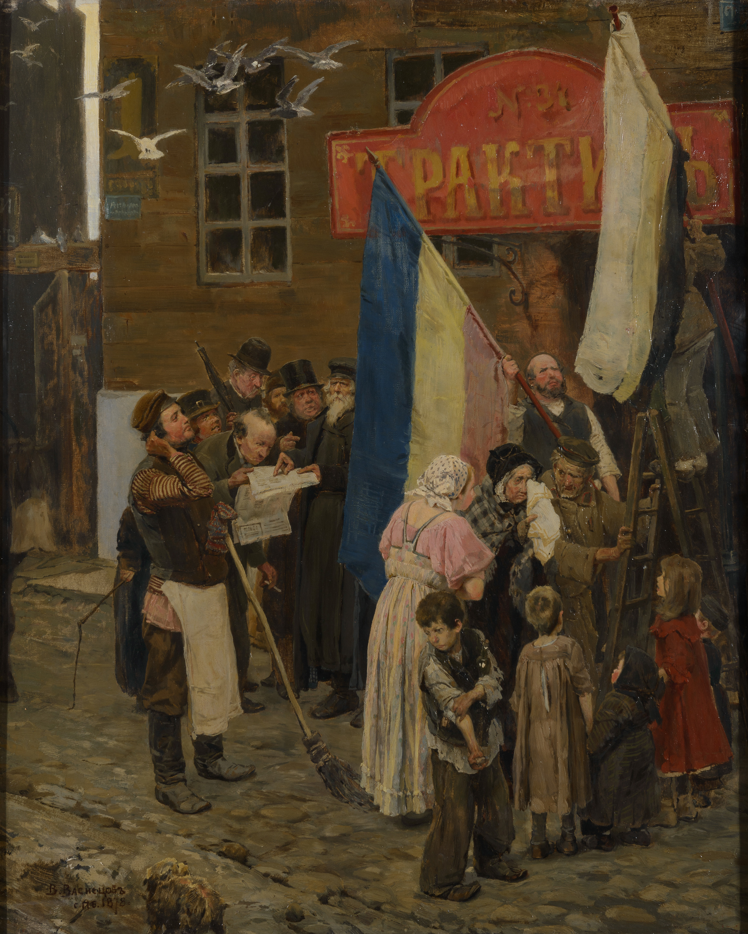 Одна из ранних жанровых картин Виктора Васнецова, кажется, совсем не предвещает сказочных и былинных композиций его последующего творчества, таких, как «Аленушка» или «Три богатыря». Русско-турецкая война 1877–1878 годов вызвала патриотический подъем в русском обществе, стремление освободить болгар от турецкого ига. Турецкая крепость Карс была взята штурмом российскими войсками под командованием генерала И.Д. Лазарева после продолжительной осады в ночь на 6 (18) ноября 1877 года. Это был важный эпизод войны. Сюжет картины развернут и легко «читается»: в газетах опубликовано правительственное сообщение о падении крепости Карс, весть о победе русских войск горячо обсуждается трактирными завсегдатаями и случайными прохожими. Трактирщик в патриотическом усердии водружает на своем заведении флаг, ему помогает отставной солдат. Старушка утирает слёзы. Взрослые и дети захвачены этим событием. Картина впервые была показана на VI выставке передвижников (1878).